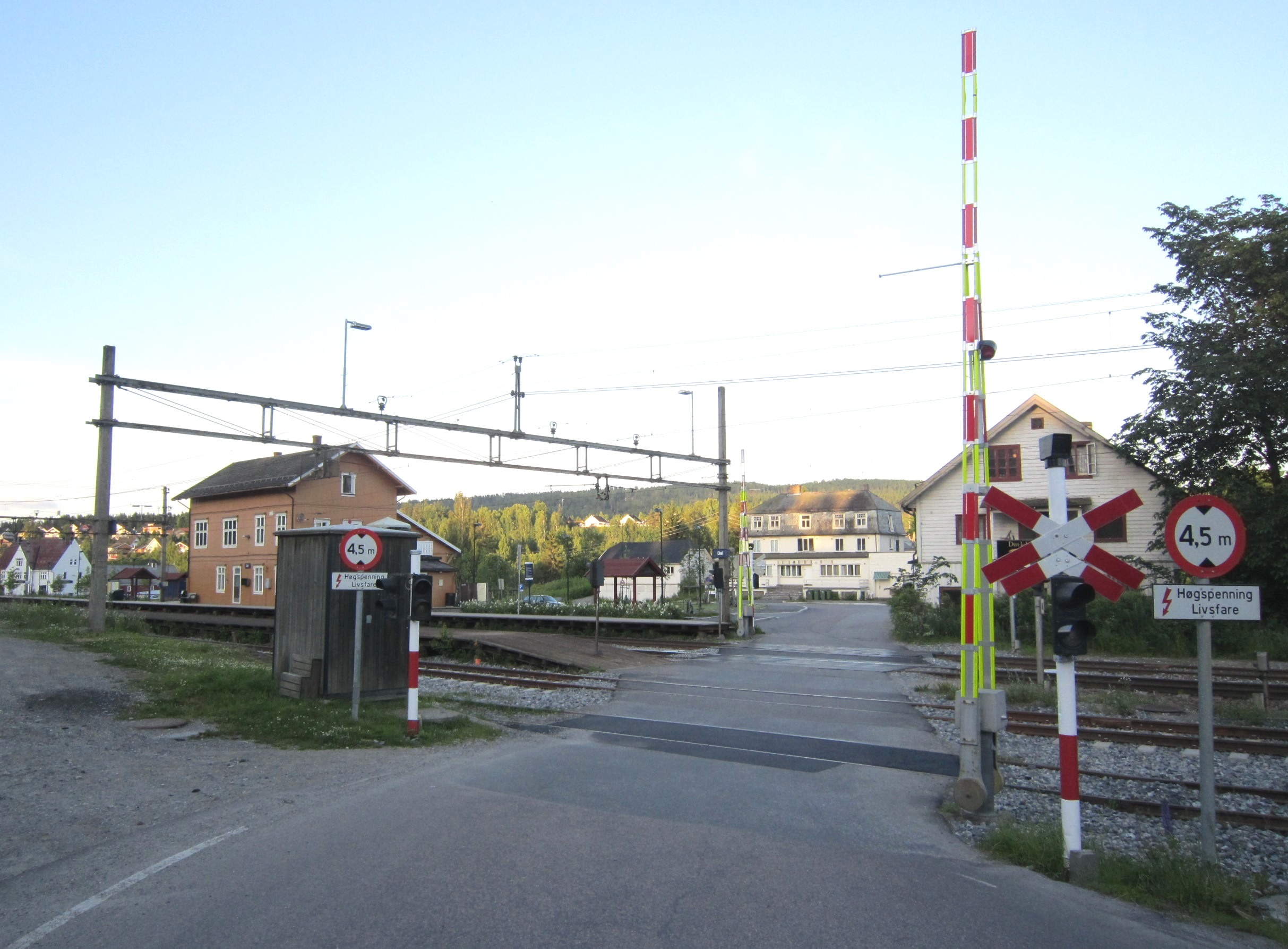 Fylkesvei 503 krysser Hovedbanen ved Dal stasjon